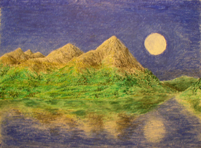 Lindon